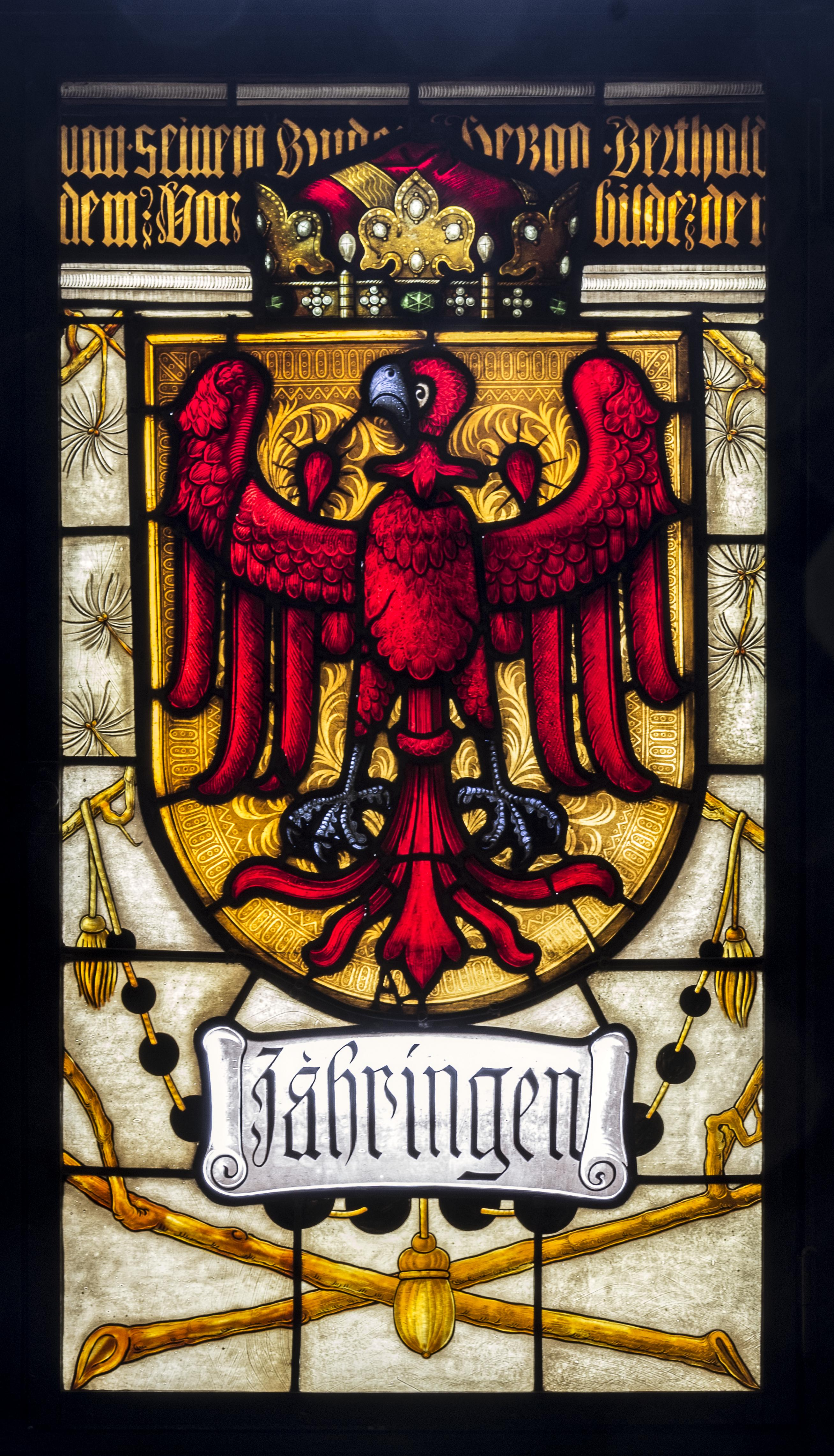 Fensterbilder im historischen Ratssaal: Das mittlere Fenster Zähringer Wappen